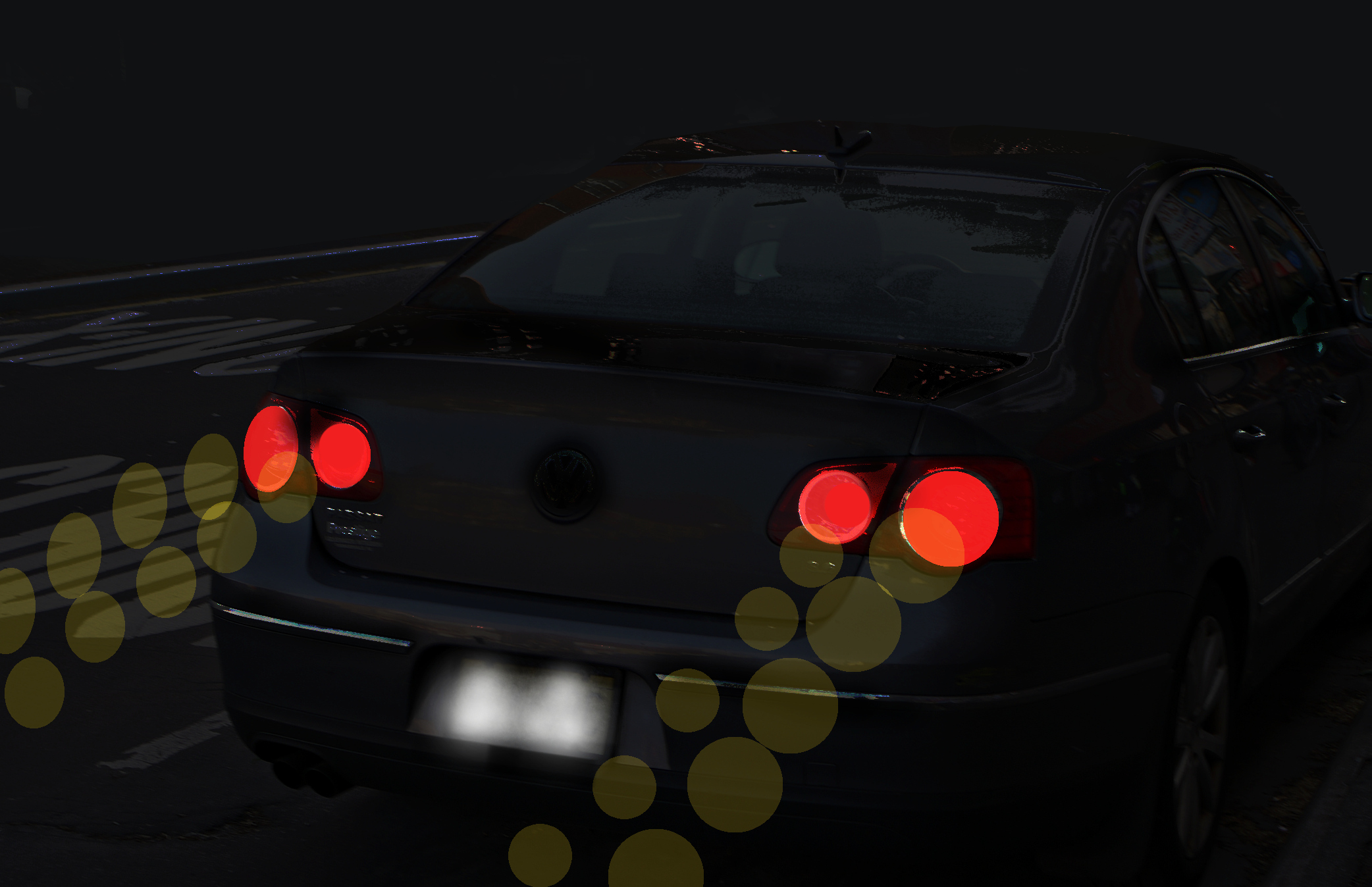 Eindruck des Perlschnur-Effekts (retuschiert)